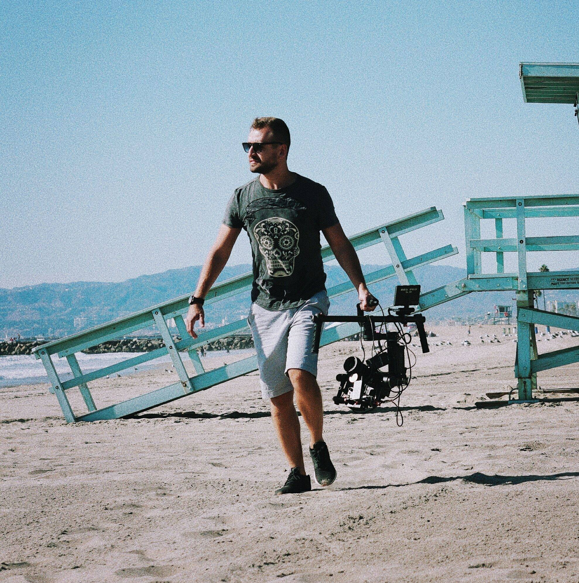 Daniel Zlotin beim Videodreh zu Boom Boom von Daddy Yankee, RedOne, French Montana & Dinah Jane